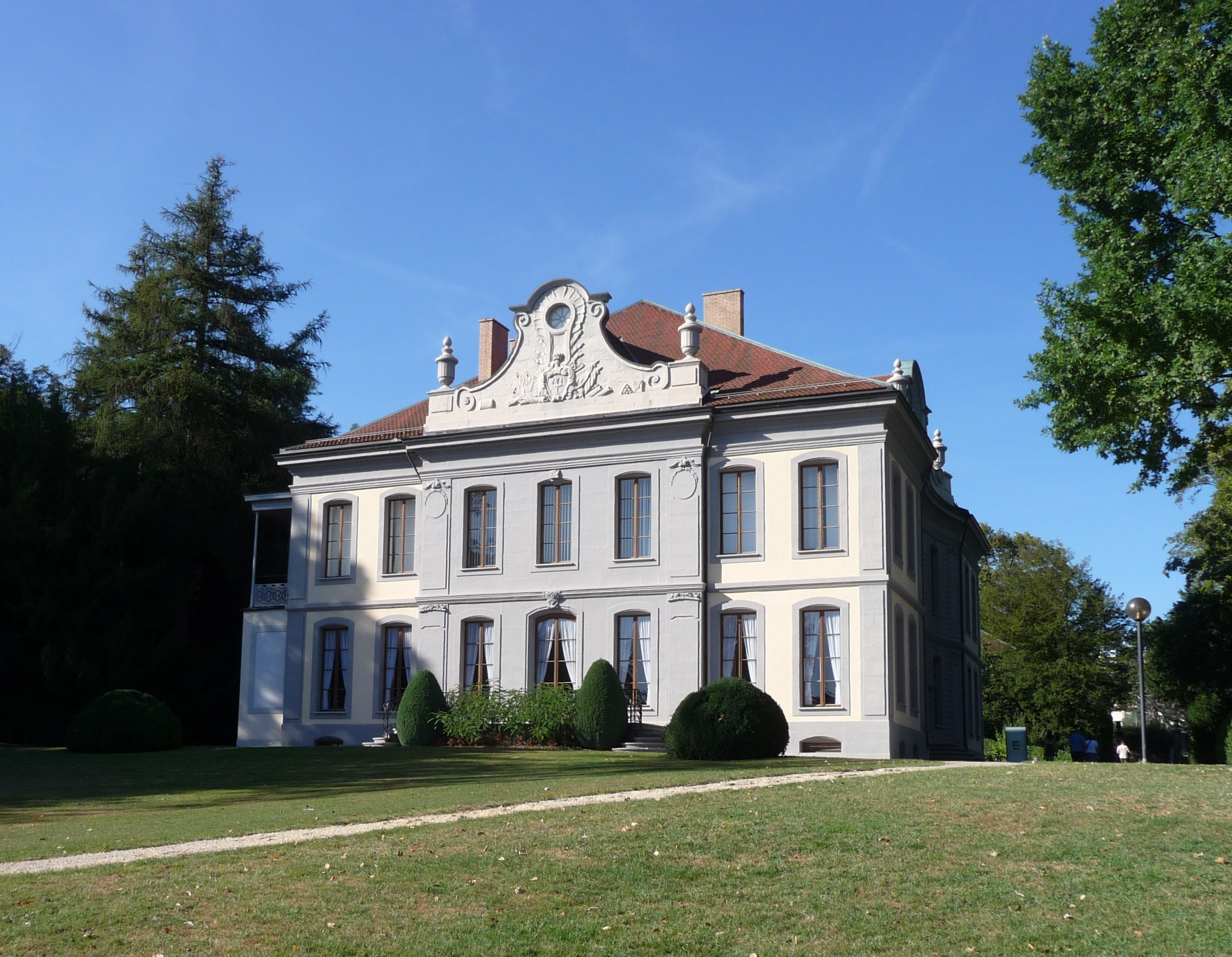 La Musée de l'Elysée à Lausanne.